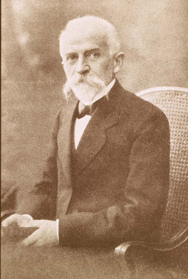 Photographie du professeur Vuillemin (1861 - 1932), scientifique et mycologue.